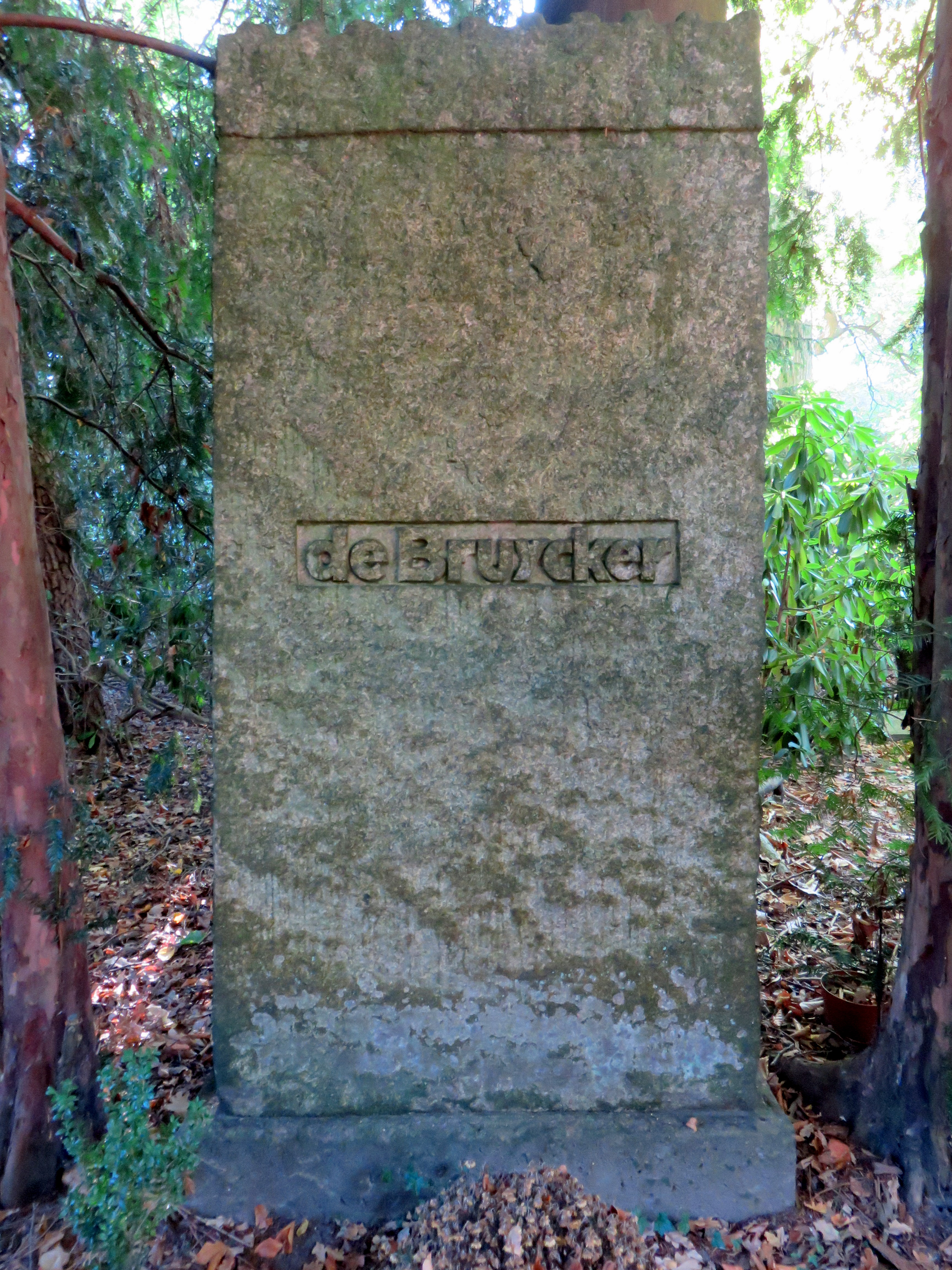 Grab für den deutschen Kunstmaler Hermann de Bruycker, Friedhof Ohlsdorf, Planquadrat Z 11 (südwestlich Nordteich).